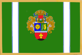 Прапор Городоцького району